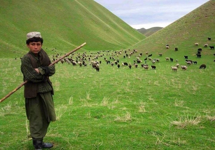 شيرعلي دولتزئ